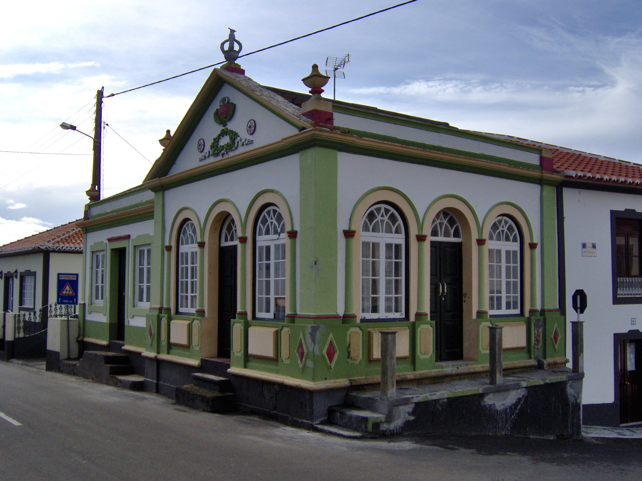 Império do Divino Espírito Santo do Raminho, Angra do Heroísmo, Terceira, Açores